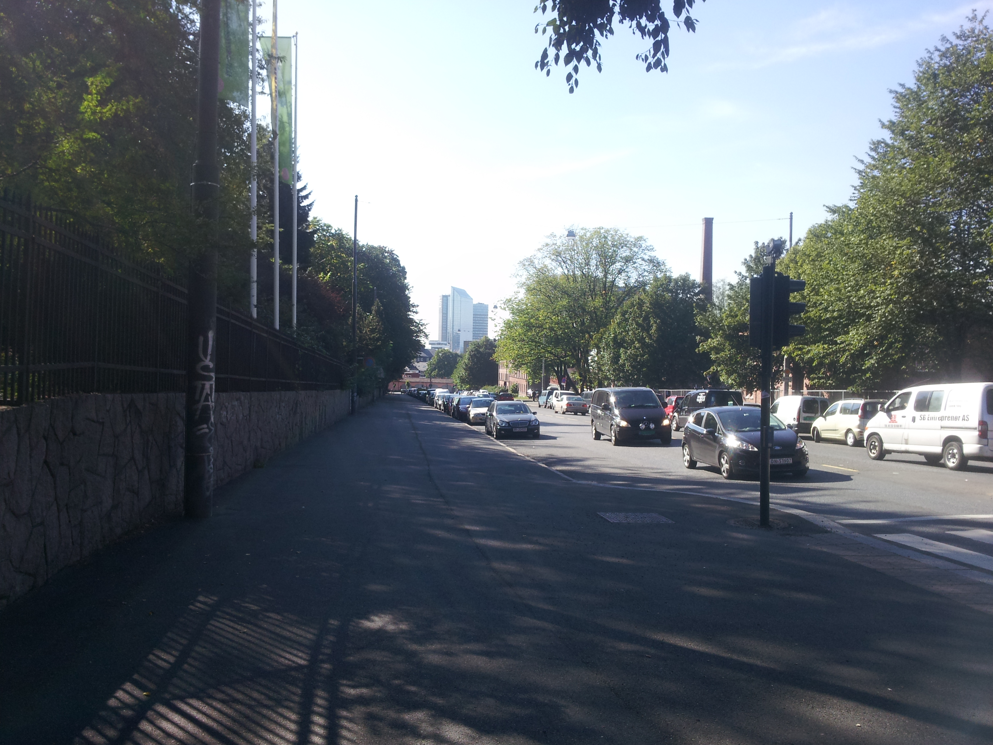 Sars' gate på Sofienberg i Oslo, sett mot sør. Gaten utgjør grensa mot Tøyen, her sett til venstre i bildet med Botanisk Hage. I bakgrunnen har man høyhusbegyggelsen på Vaterland.